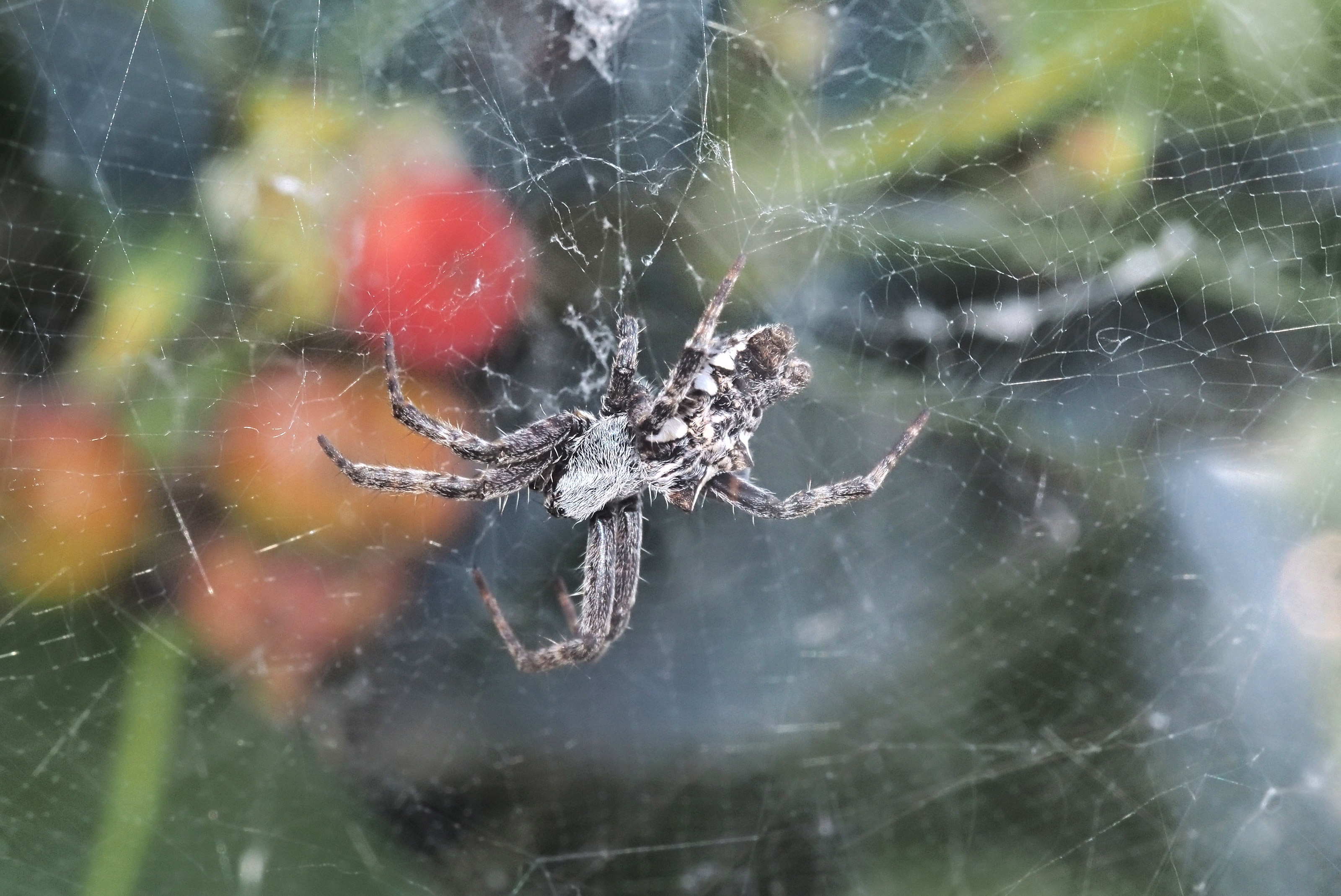 Cyrtophora citricola, hembra. Sobre acebo (Ilex aquifolium). Losar de la Vera (Cáceres, España).